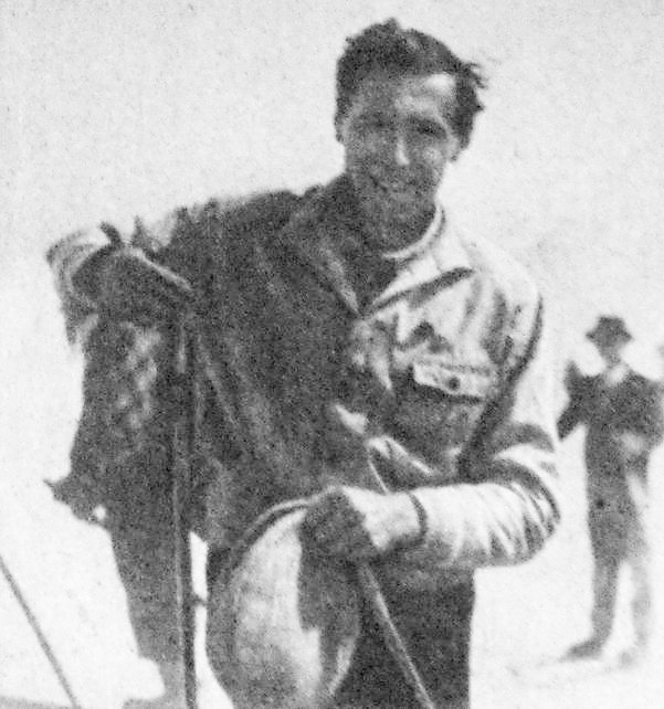 1930年の訪日時のハンネス・シュナイダー